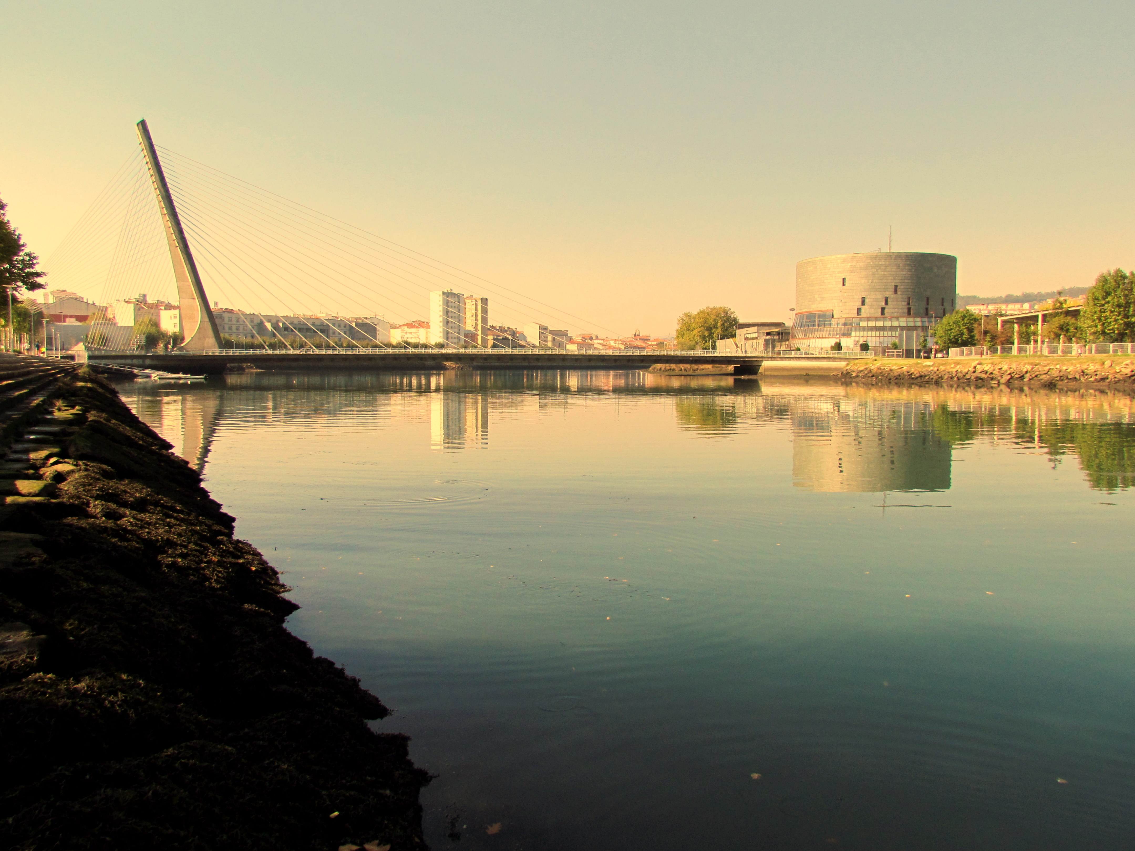 Reflejos